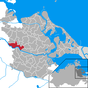 Gützkow, Landkreis Ostvorpommern, Mecklenburg-Vorpommern